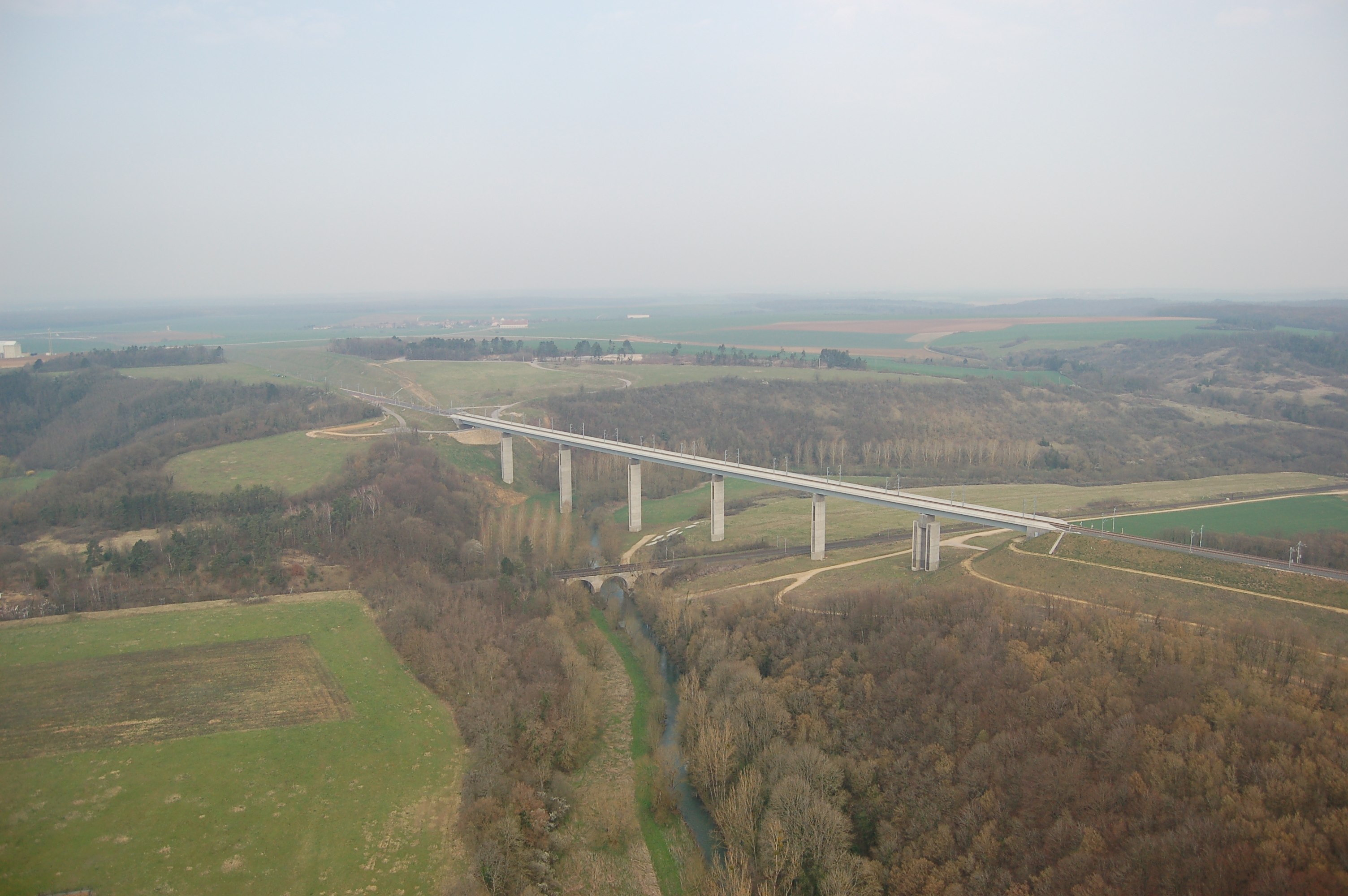 Viaduc TGV Jaulny 3 avril 2007.jpg